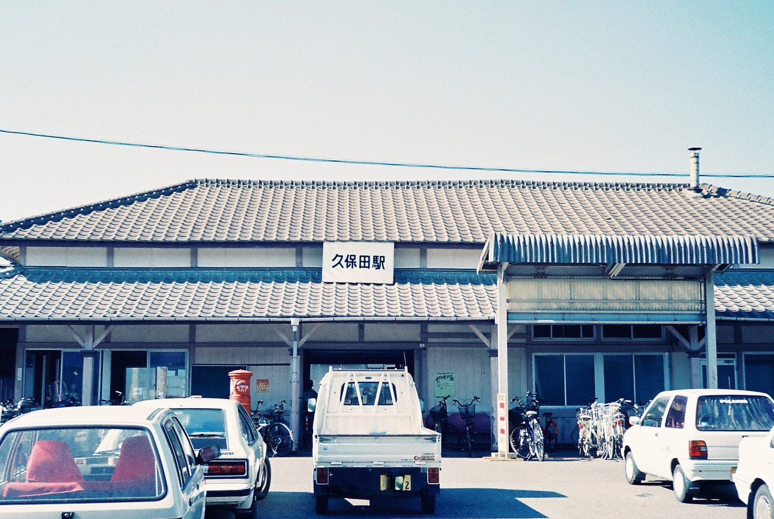 久保田駅旧駅舎（1990年8月当時）